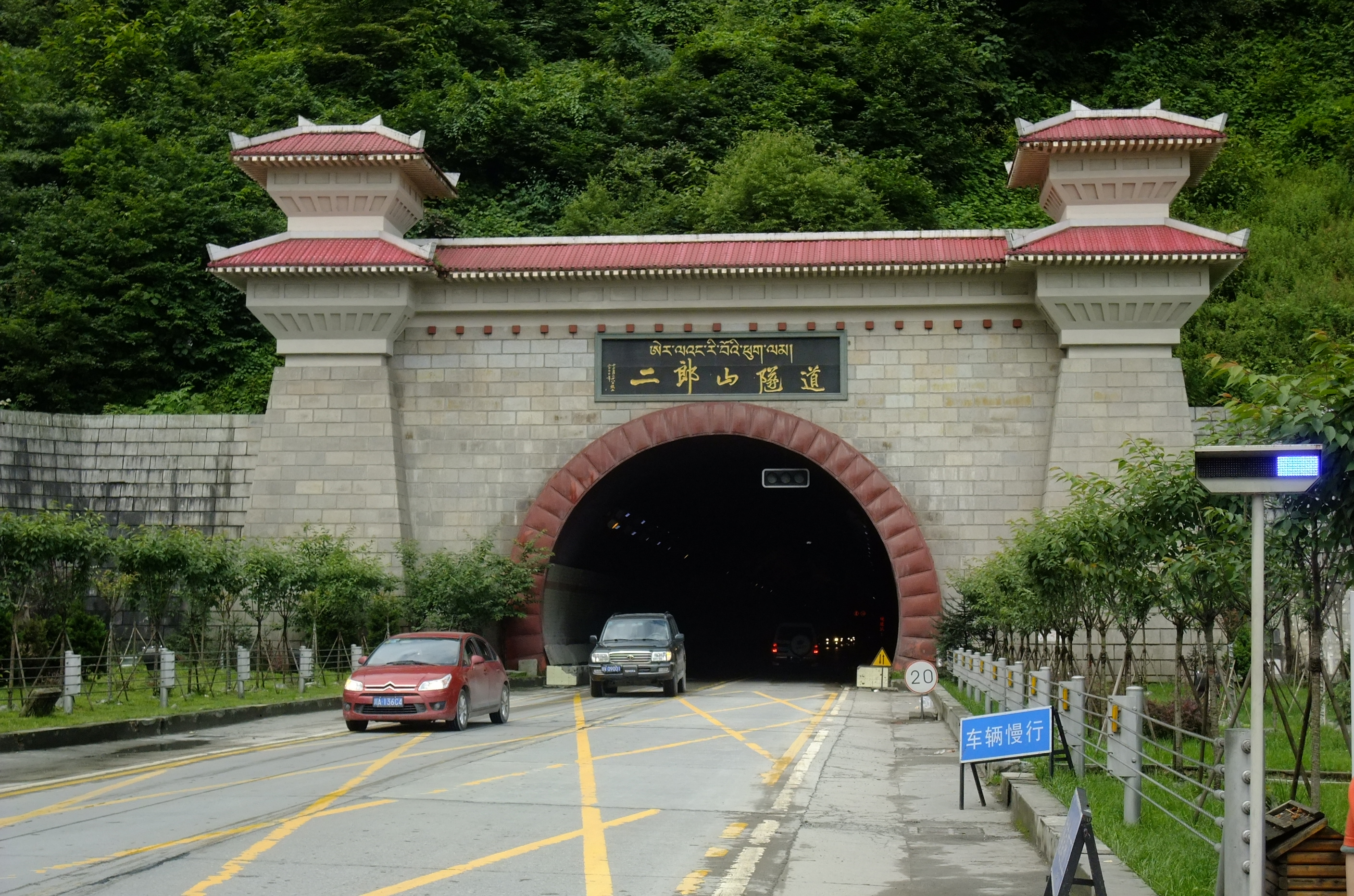 川藏公路二郎山隧道东口